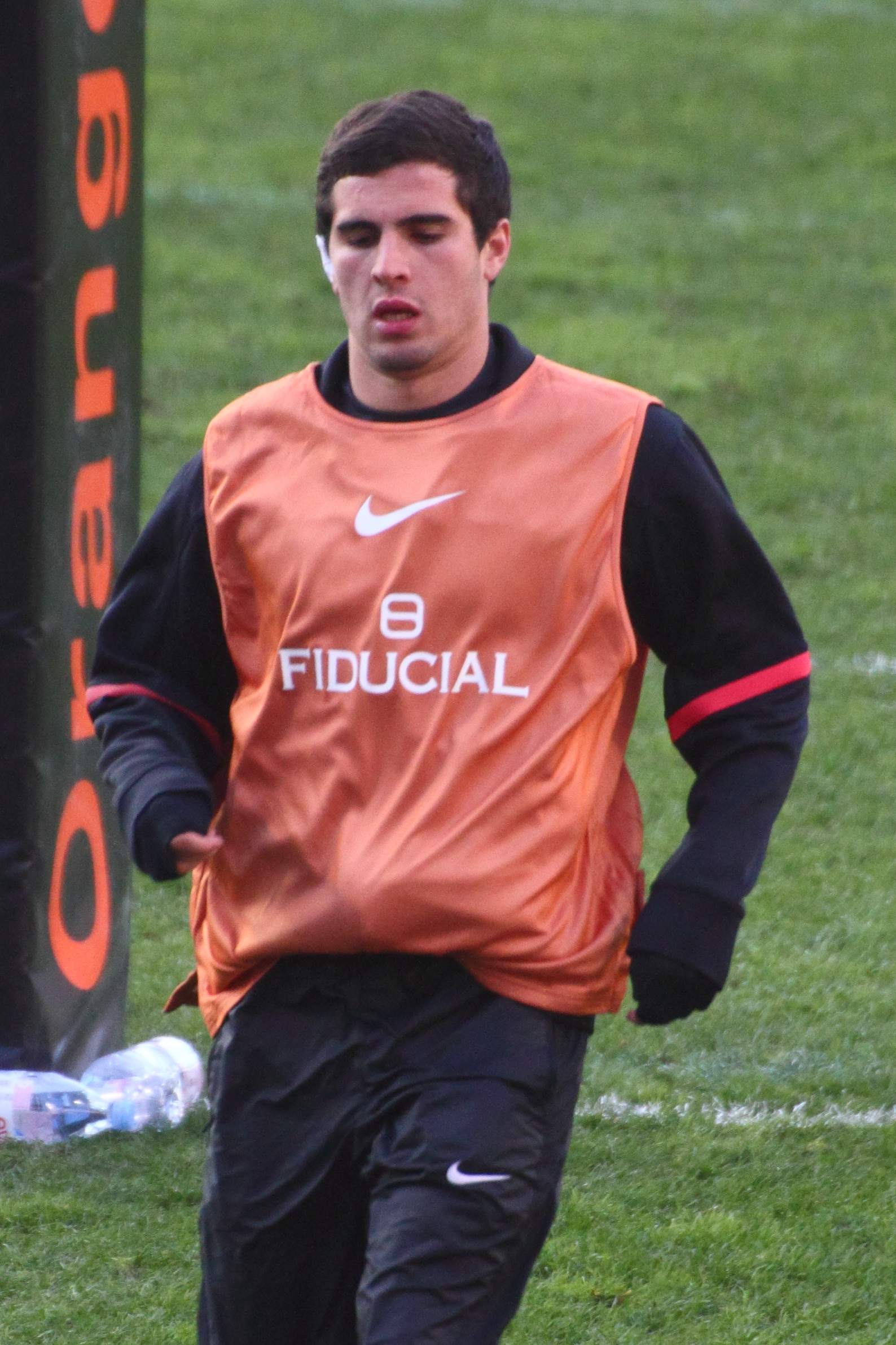 Top 14 2012-2013 — 1 décembre 2012, Stadium de Toulouse. Match between: Stade toulousain — ASM Clermont-Auvergne